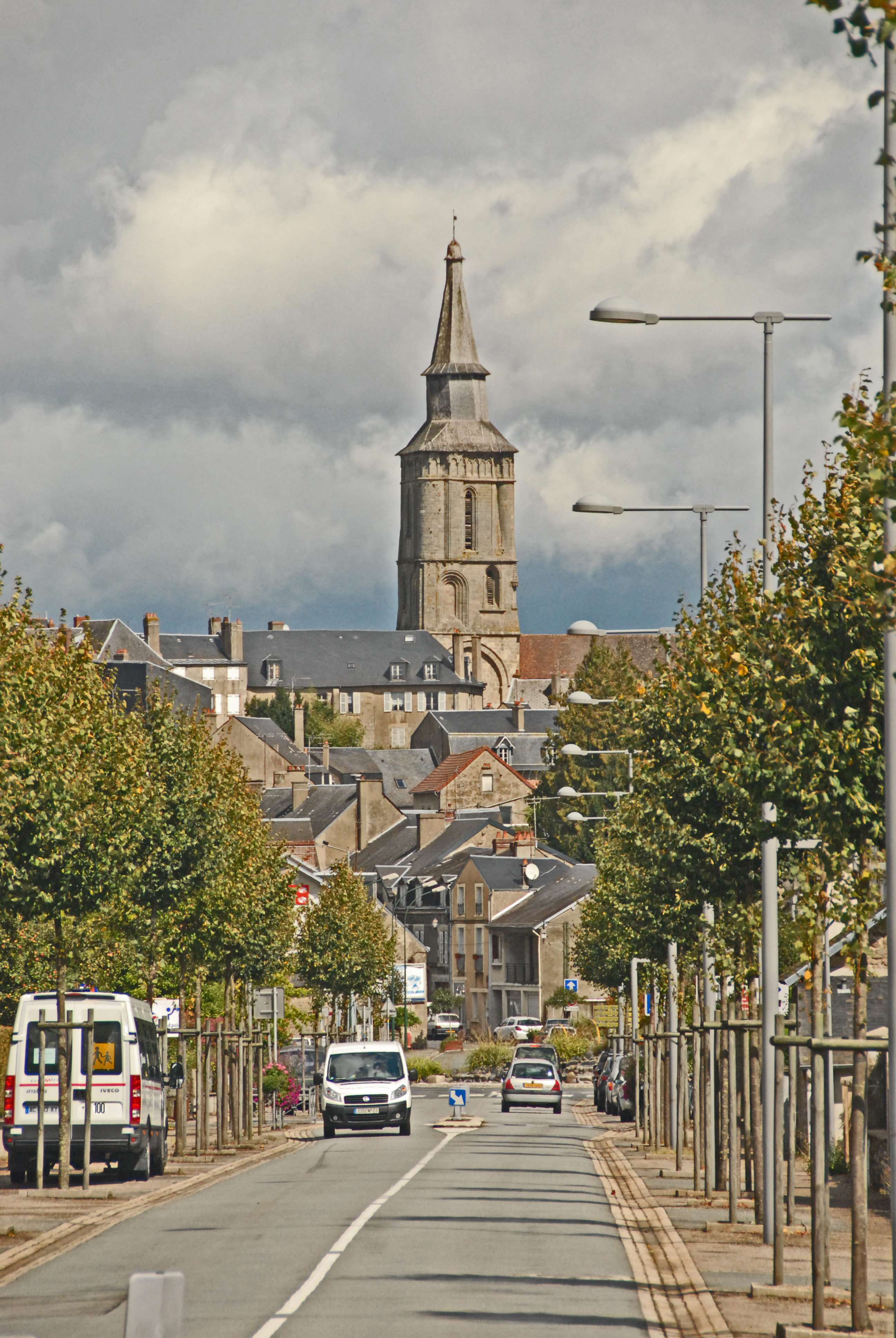 N.-D. de La Souterraine, Stadtzentrum von S